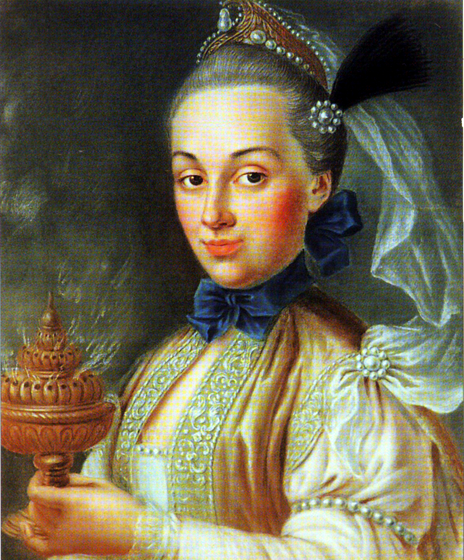 Жан де Самсуа. Портрет княгини М.Я. Грузинской - "Азия", 1756. Мария Яковлевна Грузинская (ок. 1728-1761), урожденная Долгорукая, жена царевича Георгия Вахтанговича Грузинского (1712-1786), сына Вахтанга VI.